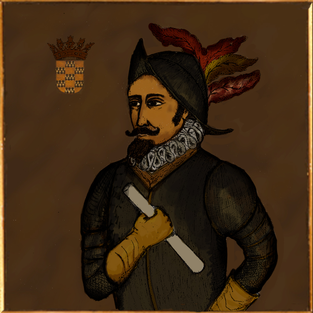 Fue capitán, explorador y conquistador español, hijo de Pedro Martínez de Rivilla y María Sáenz de Velasco. Descendiente por parte de su madre de Pedro Fernández de Velasco Conde de Haro y Duque de Frias. Por ende perteneciente a la Casa de Velasco y descendiente de los Condestable de Castilla.​ Fue compañero de exploración y conquista de Sebastián de Belalcázar en los territorios de Colombia y Ecuador, aunque ya habia participado en la conquista del Perú.